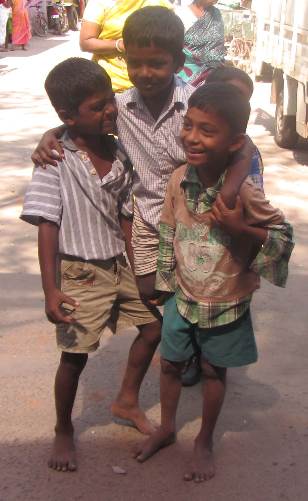 கால் தூக்கிற கணக்கப்பிள்ளை என்னும் தமிழக நாட்டுப்புற விளையாட்டு. own shot.